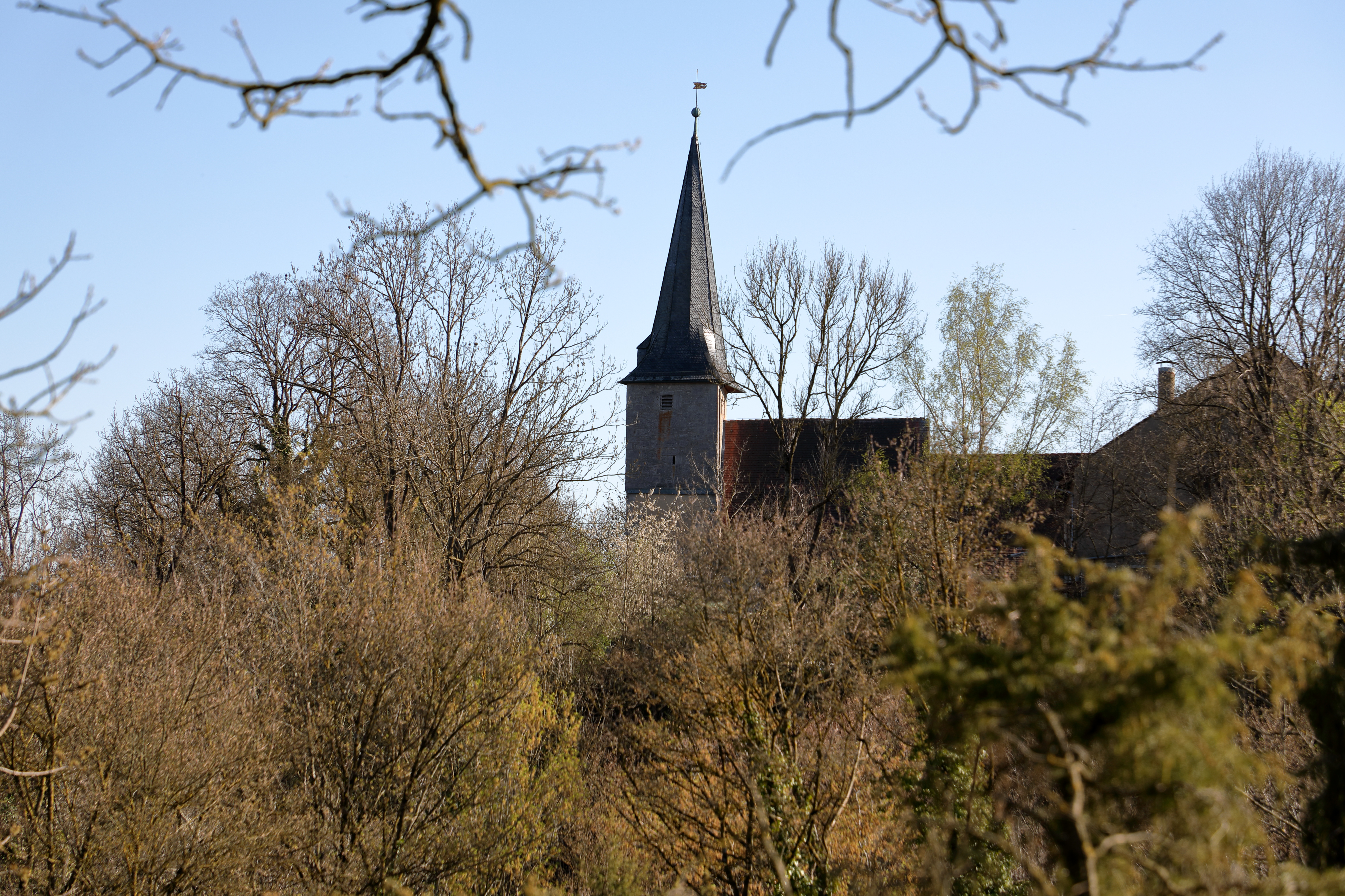 Das Flächenhafte Naturdenkmal Wacholderheide-Steppenflora Riegelberg im Creglinger Ortsteil Oberrimbach-Lichtel mit der ID 81280200026. Im Hintergrund die Evangelische Nikolauskirche des Weilers Lichtel.